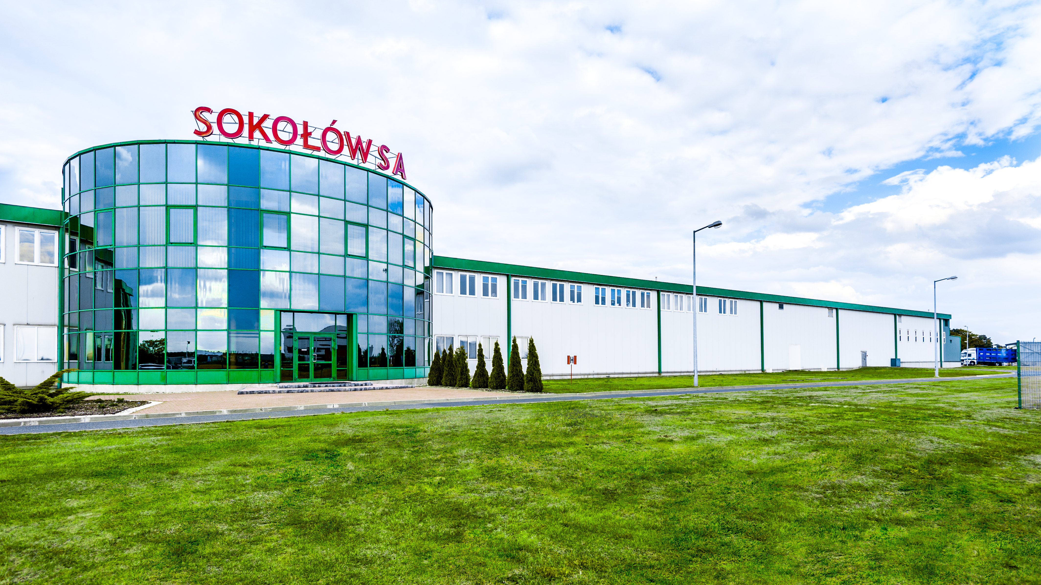 Sokołów SA - Robakowo